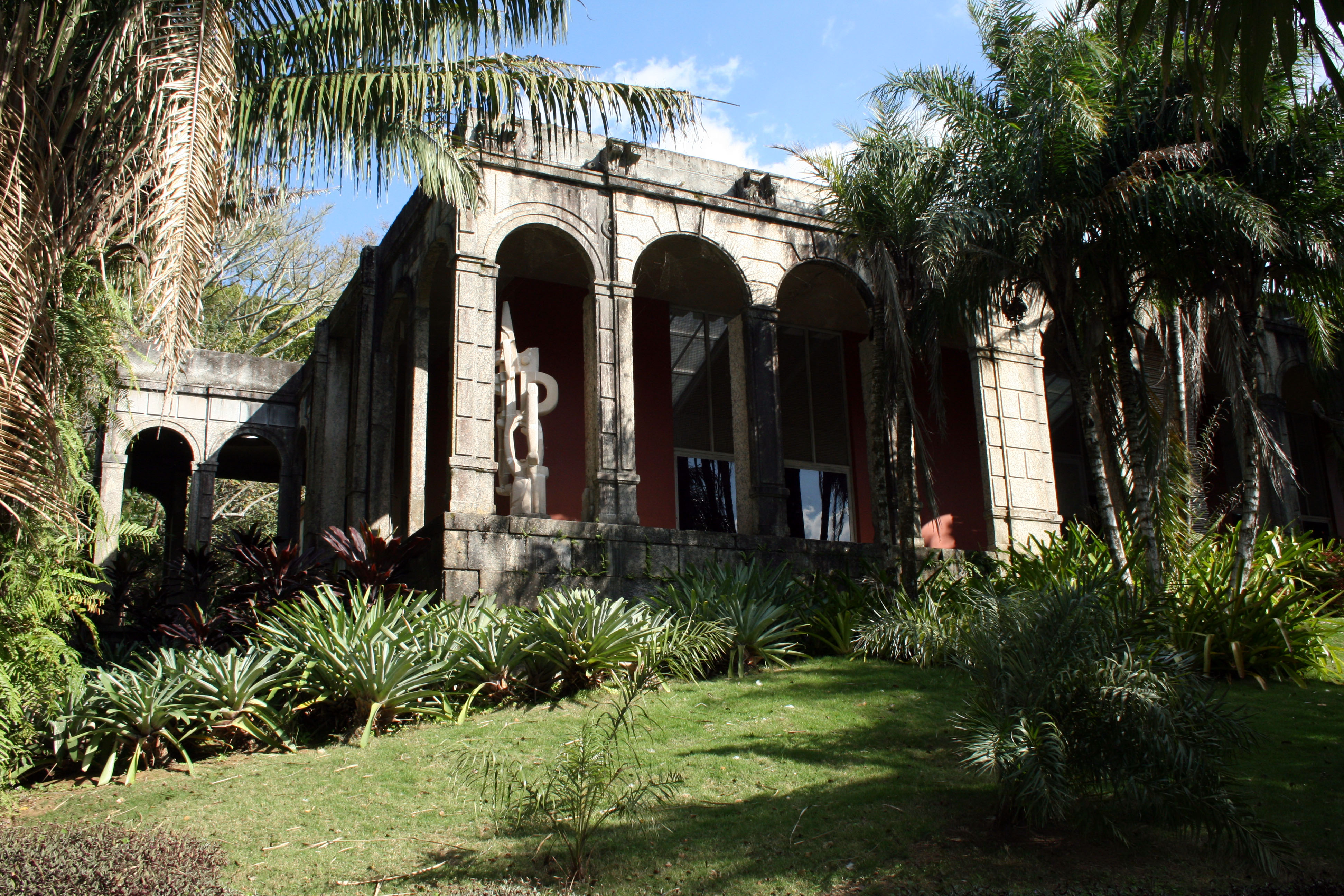 Sítio Roberto Burle Marx. Endereço: Estrada Roberto Burle Marx, nº 2019 - Barra de Guaratiba - RJ.